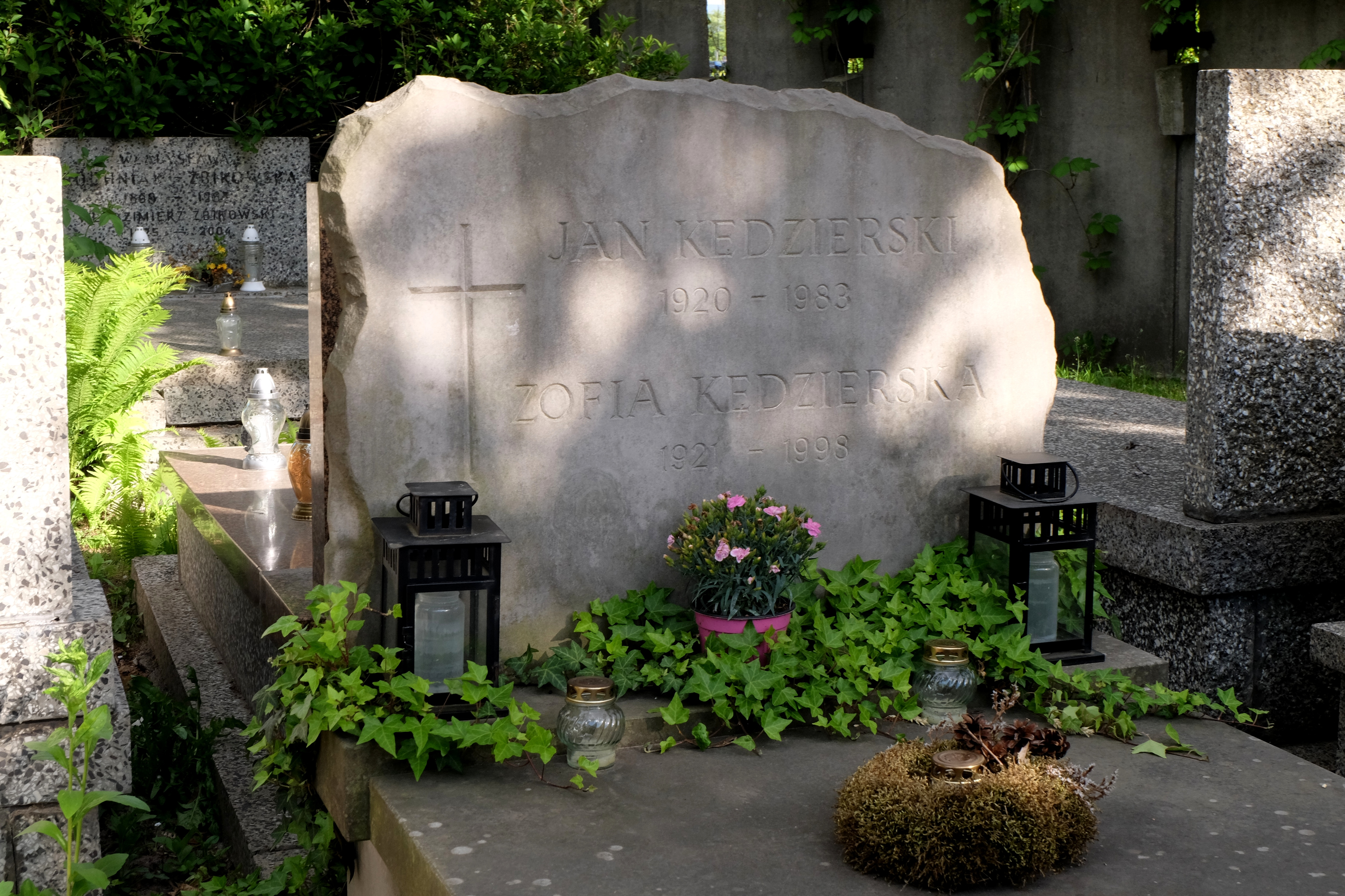 Grób działacza ruchu robotniczego Jana Józefa Kędzierskiego na Cmentarzu Wojskowym na Powązkach w Warszawie